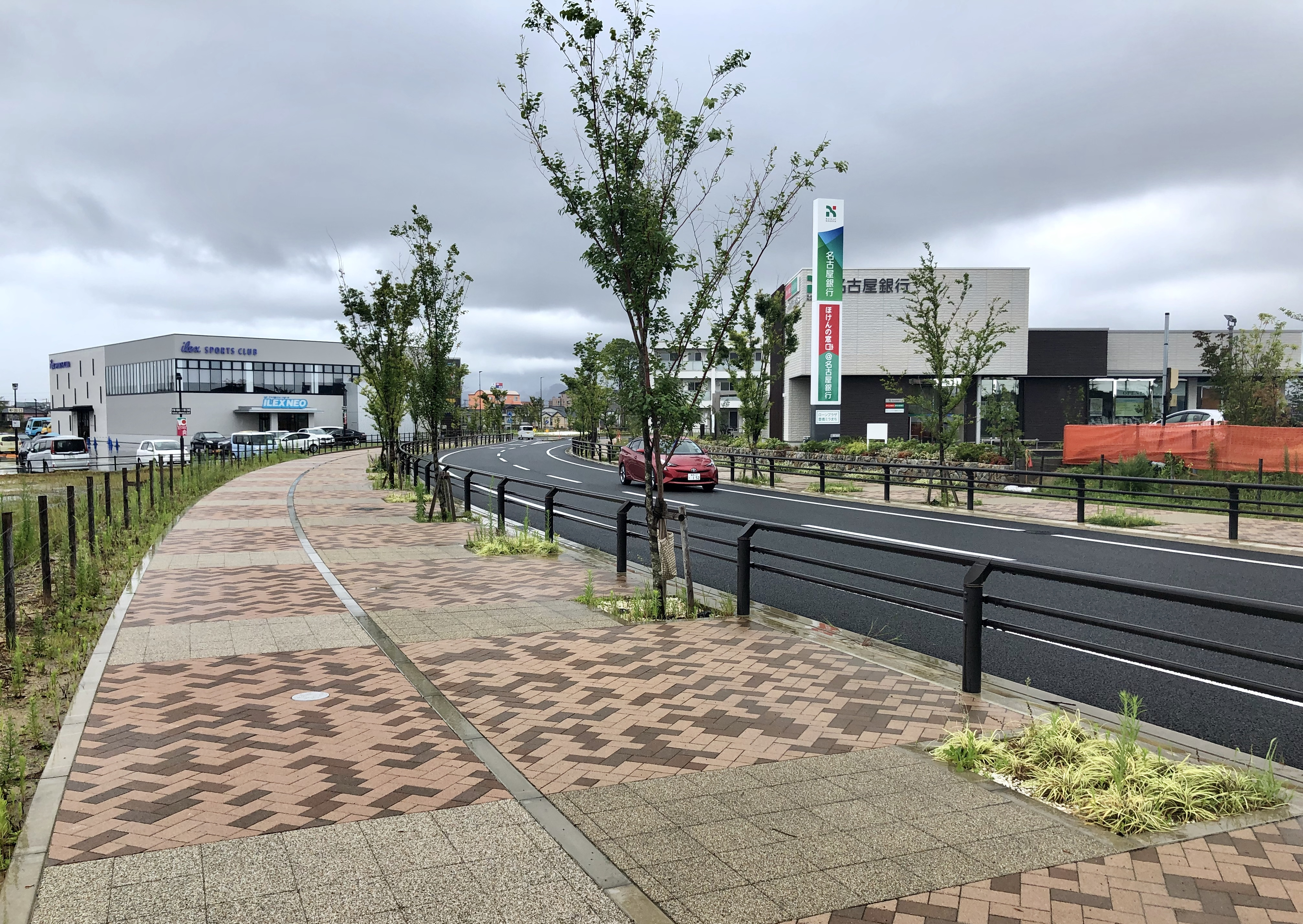 コモンステージミラまち（豊橋市曙町）